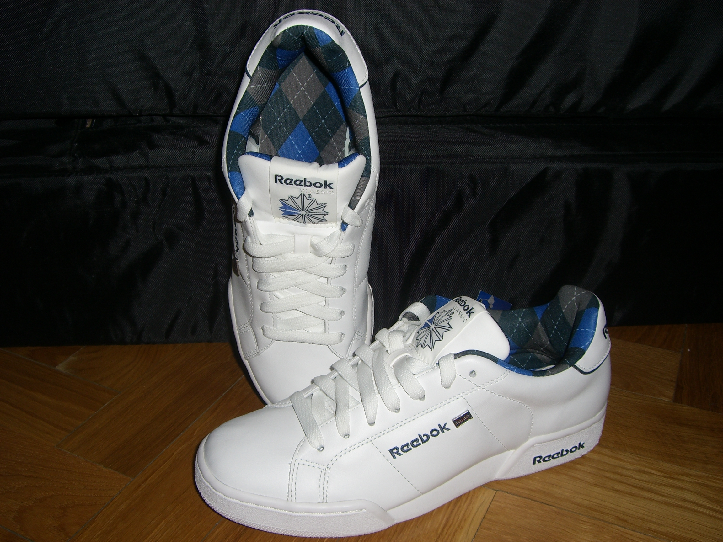 Las zapatillas que me he comprado hoy. Llevan un interior de rombos precioso de la muerte, pero a ver cuánto me duran poniéndomelas casi todos los días y andando hora y media cada jornada. Son un poco delirio mod, seguro que a Rubenest le gustarían.